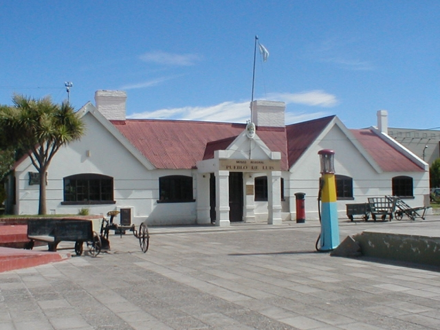 Museo Publo de Luis en Trelew, Argentina.